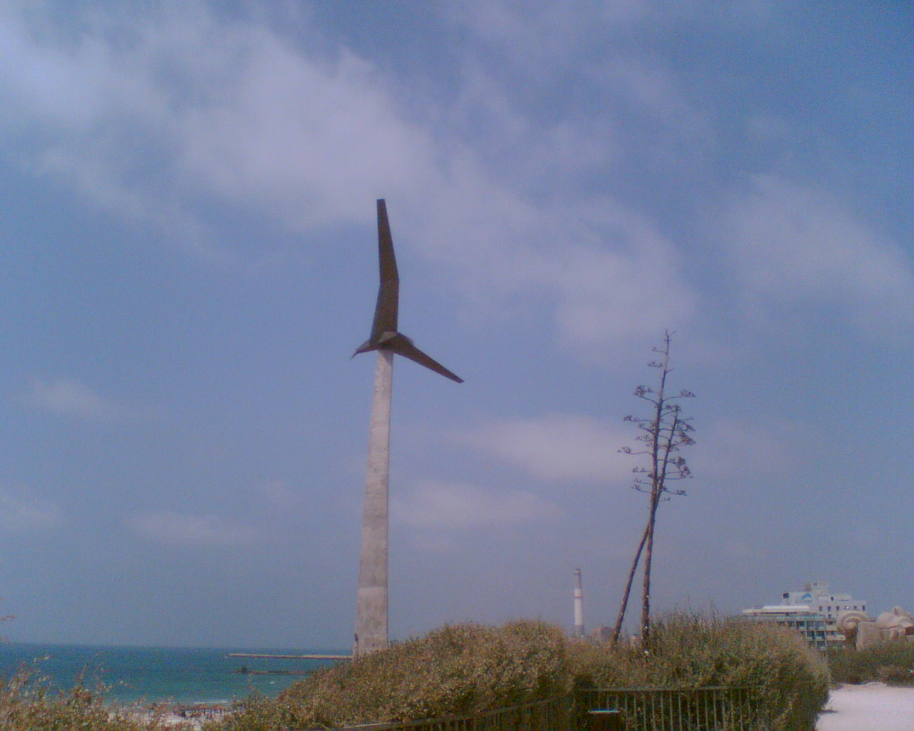 גן העצמאות, אנדרטה לזכר טייסי חיל האוויר אהרן דויד שפרינצק ומתתיהו סוקניק, שנהרגו במלחמת העצמאות, כאשר יצאו לבלום ספינה מצרית שהפגיזה את תל אביב. צילם דוד שי